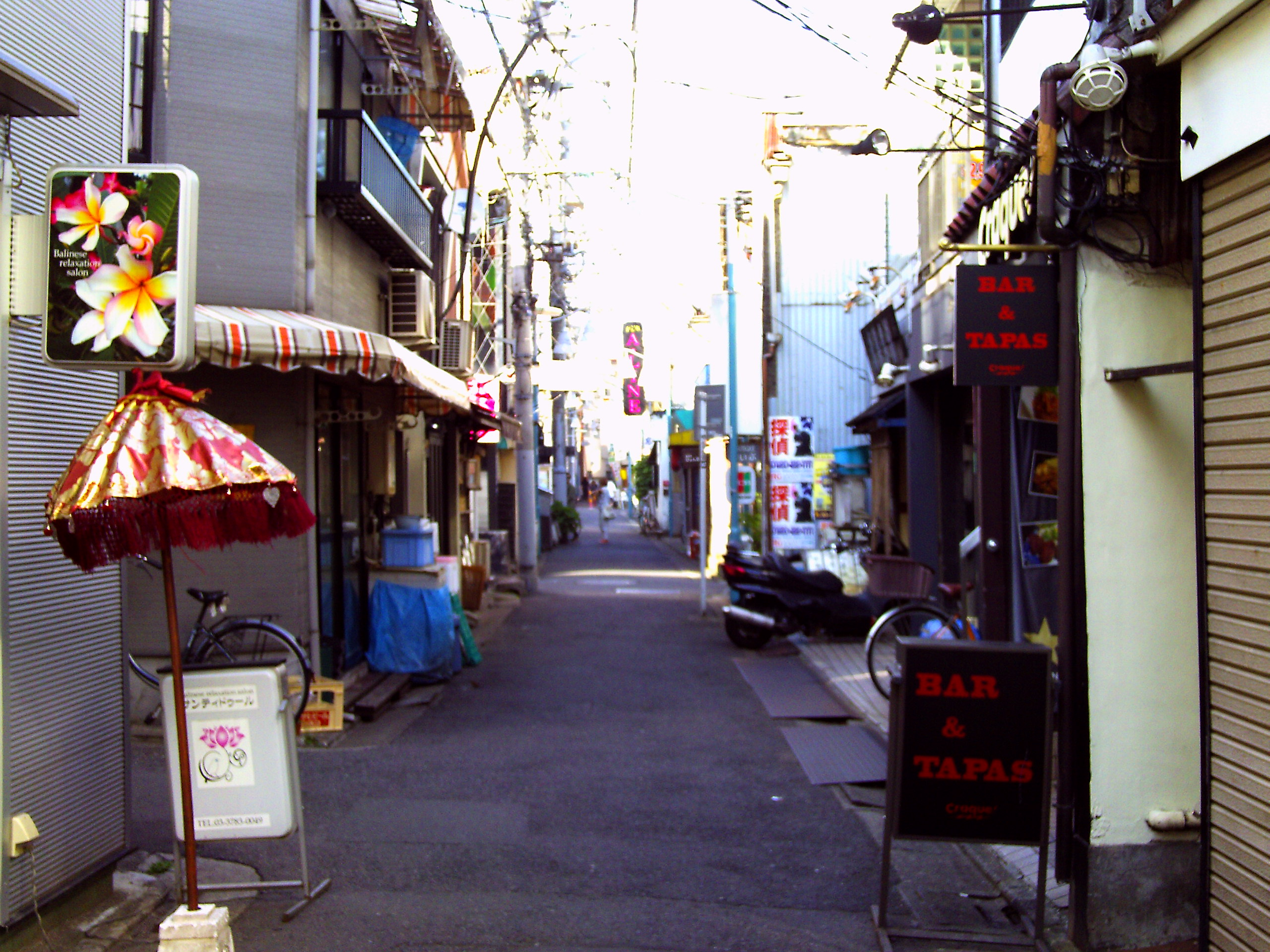 東京のしゃれた街並みづくり推進条例実施１号となる武蔵小山のりゅえる／パルムアーケードから